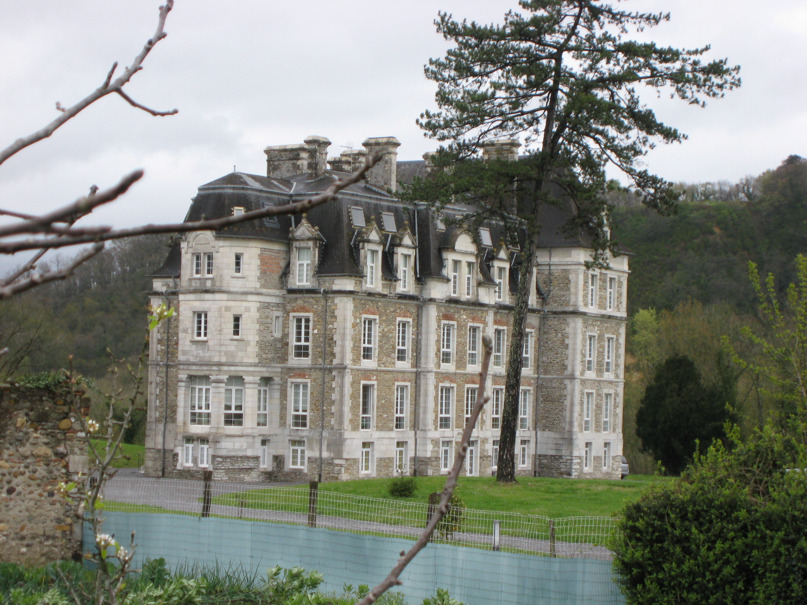 Château d'Escos (Pyrénées-Atlantiques) (Pyrénées).